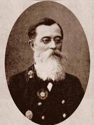 Собичевский, Василий Тарасович